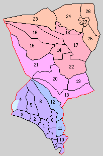 静岡県駿東郡の町村。